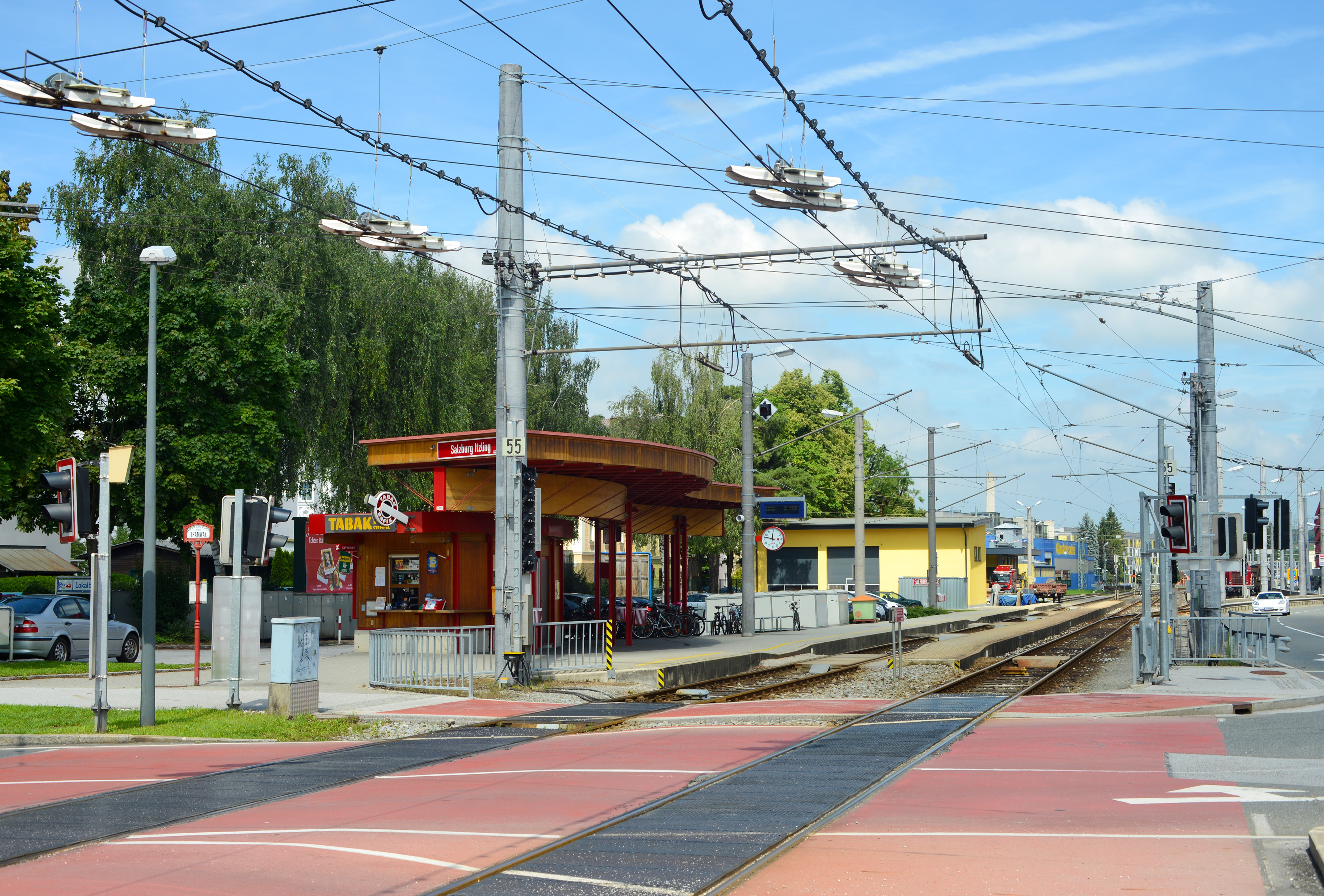 Bahnhof Salzburg Itzling an der Salzburger Lokalbahn